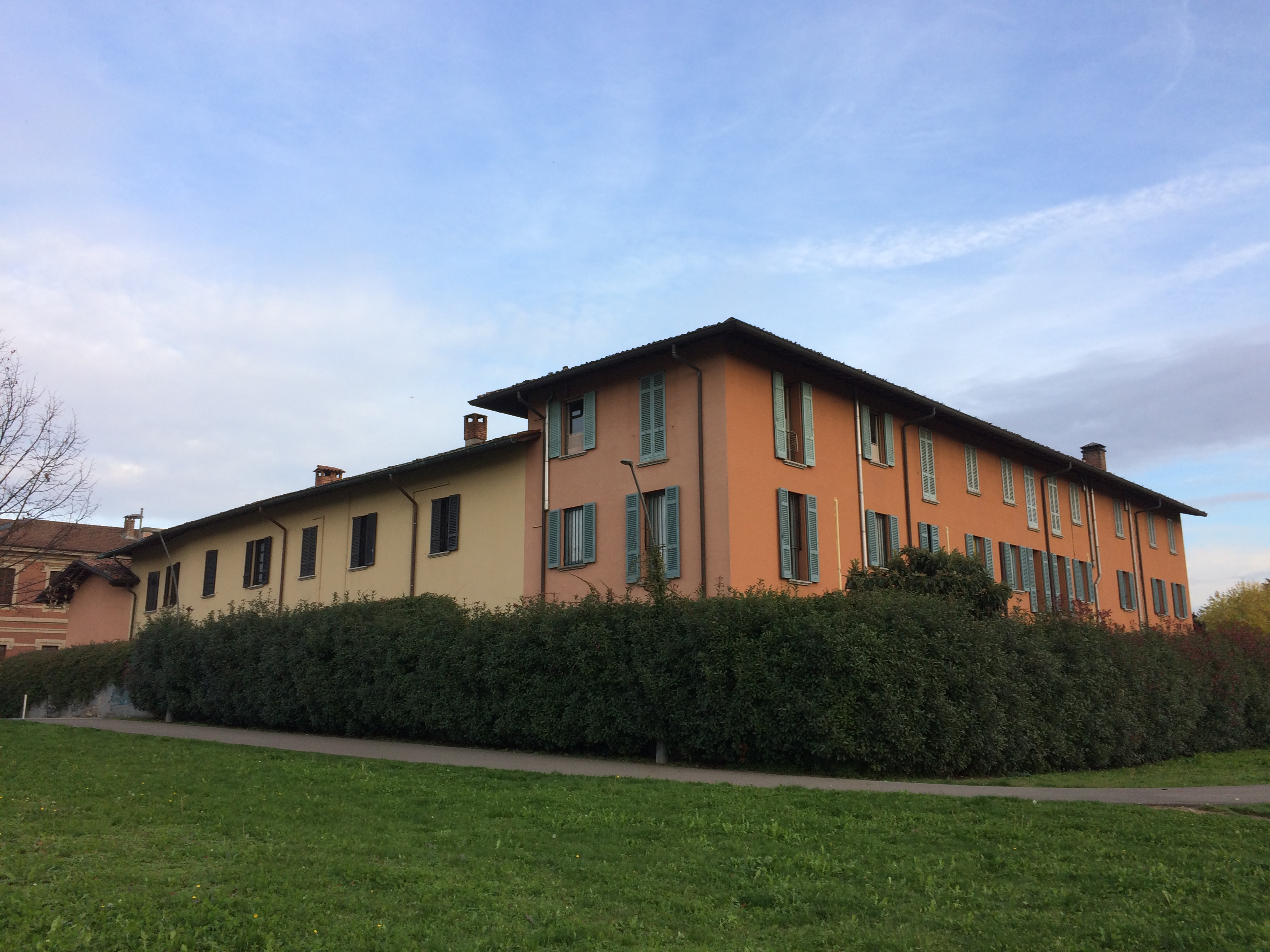 Casa Corio, edificio storico di Legnano